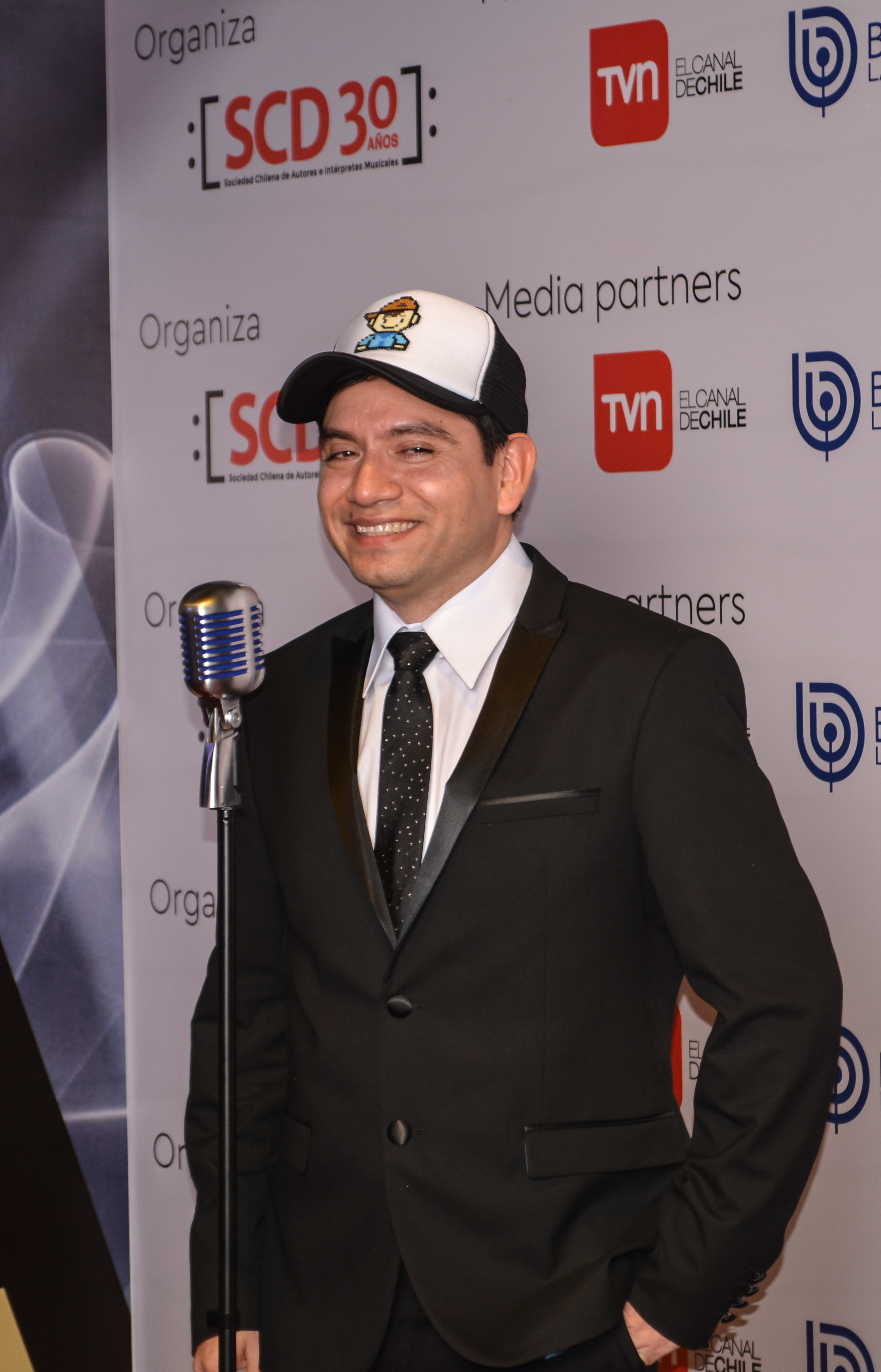 Premios Pulsar 2017